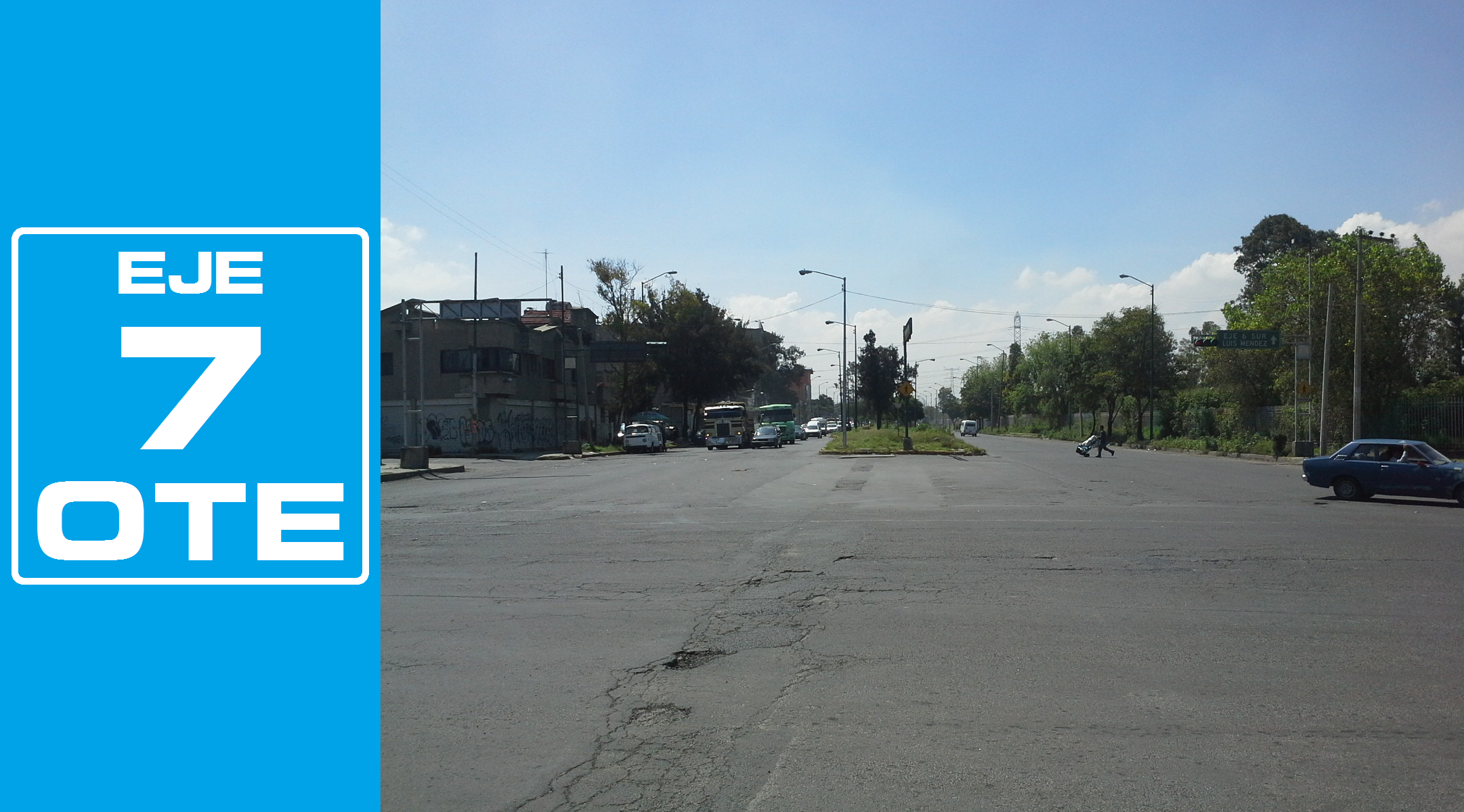 Rediseñado original de la señalética de los Ejes viales de la Ciudad de México por José García (Wiki ID: narumiyama)